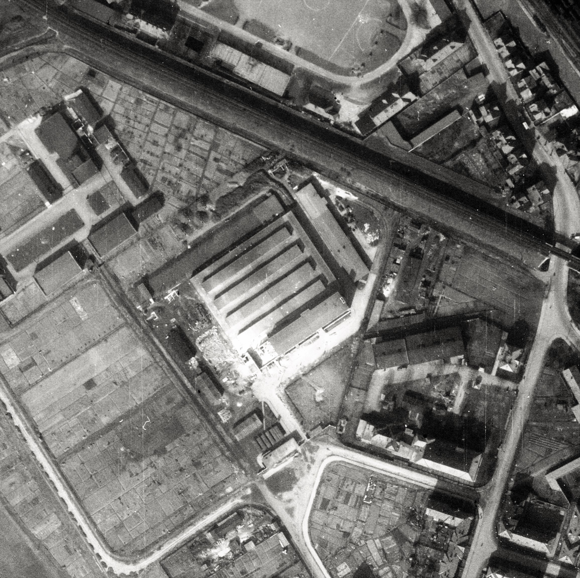 Das Gustloffwerk in Meiningen im März 1945 (Bildmitte)